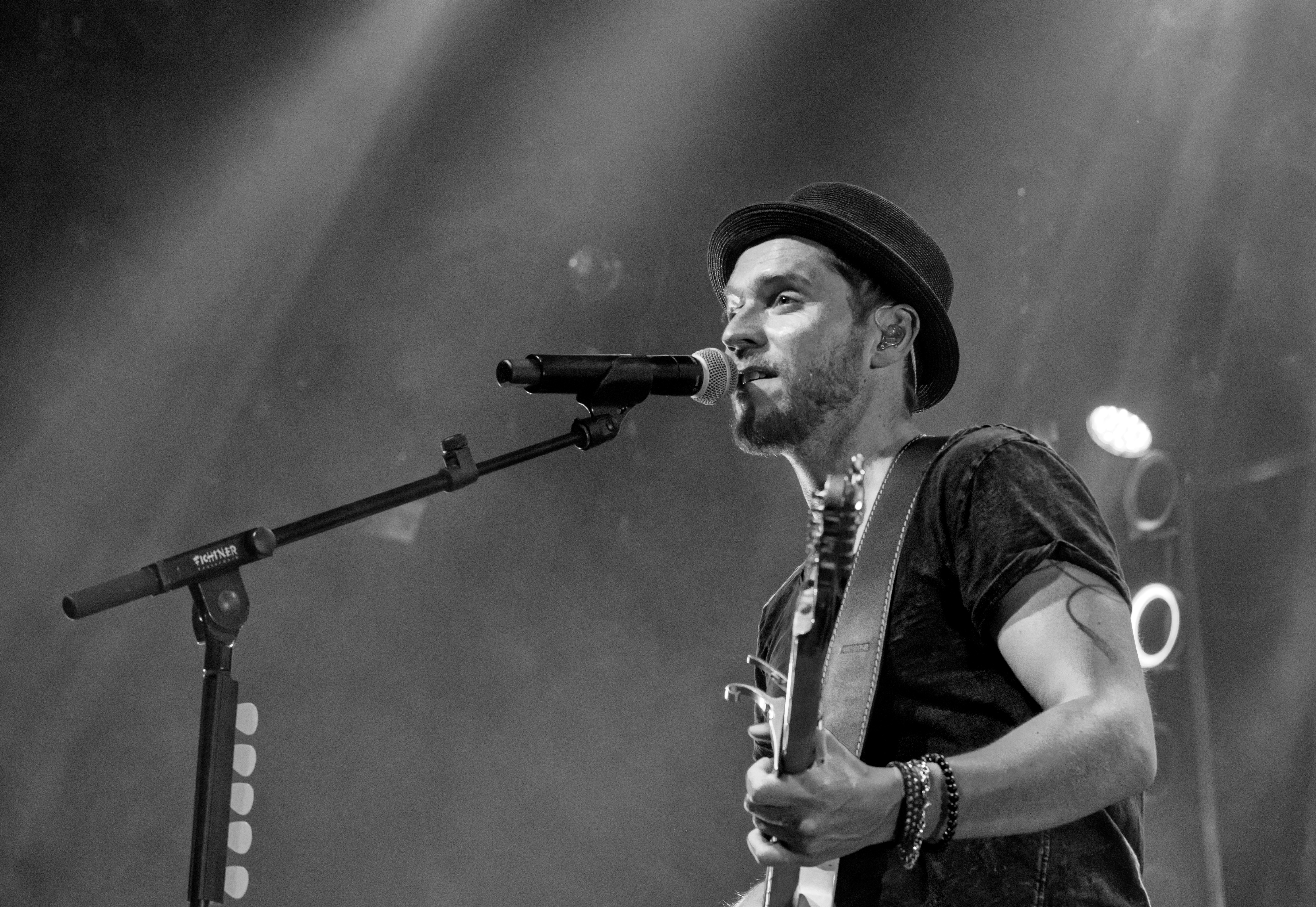 Bilder vom Zelt Musik Festival 2018 in Freiburg im Breisgau Johannes Oerding und Band am 30.07.2018